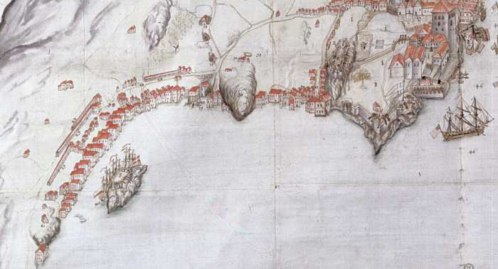 Sandviken à Bergen en 1740. Les bâtiments fins et longs sont des corderies. Auteur inconnu, carte non signée, année 1740.